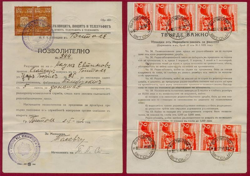 Разрешително за радио, Битоля 1942